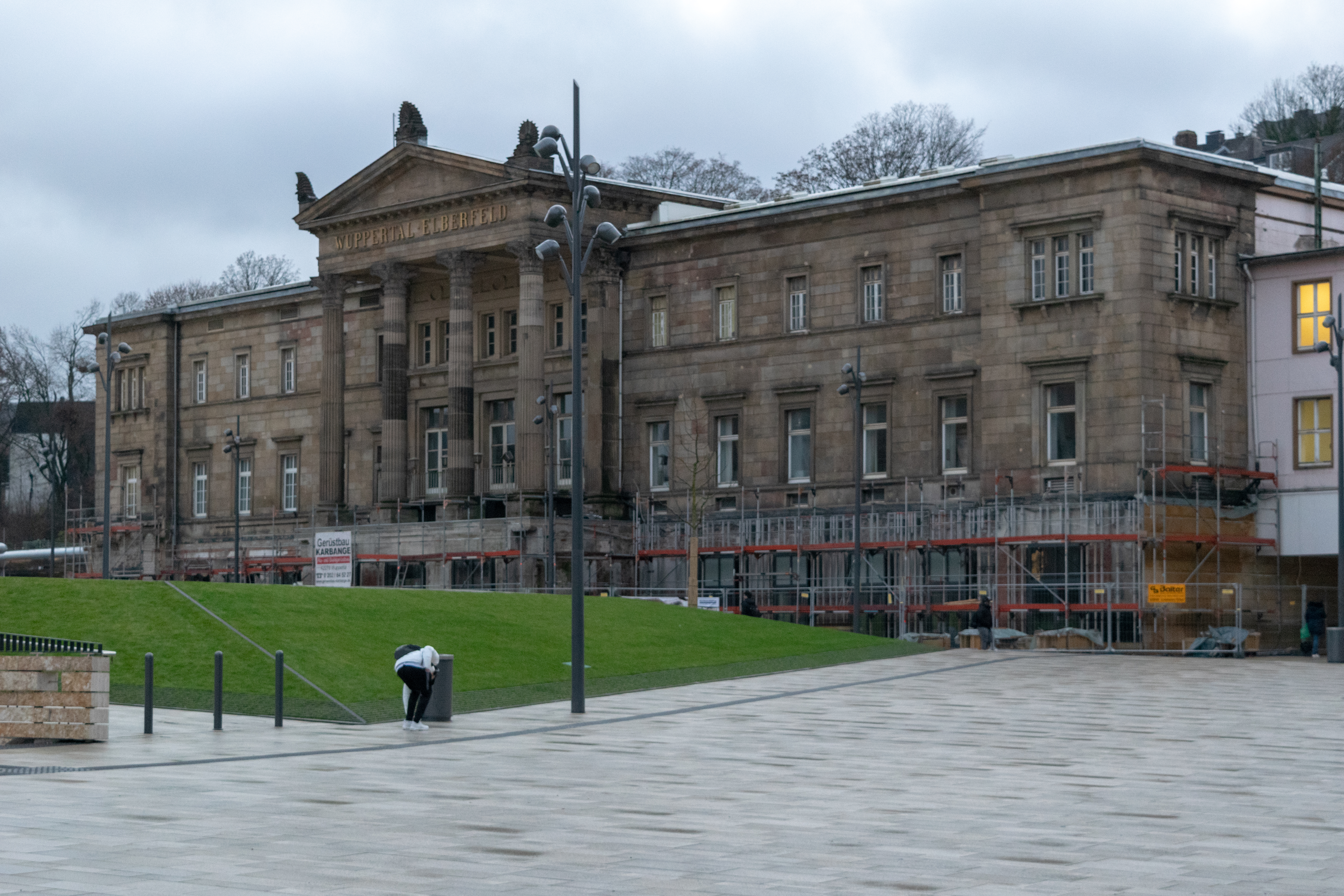 Döppersberg, Wuppertal